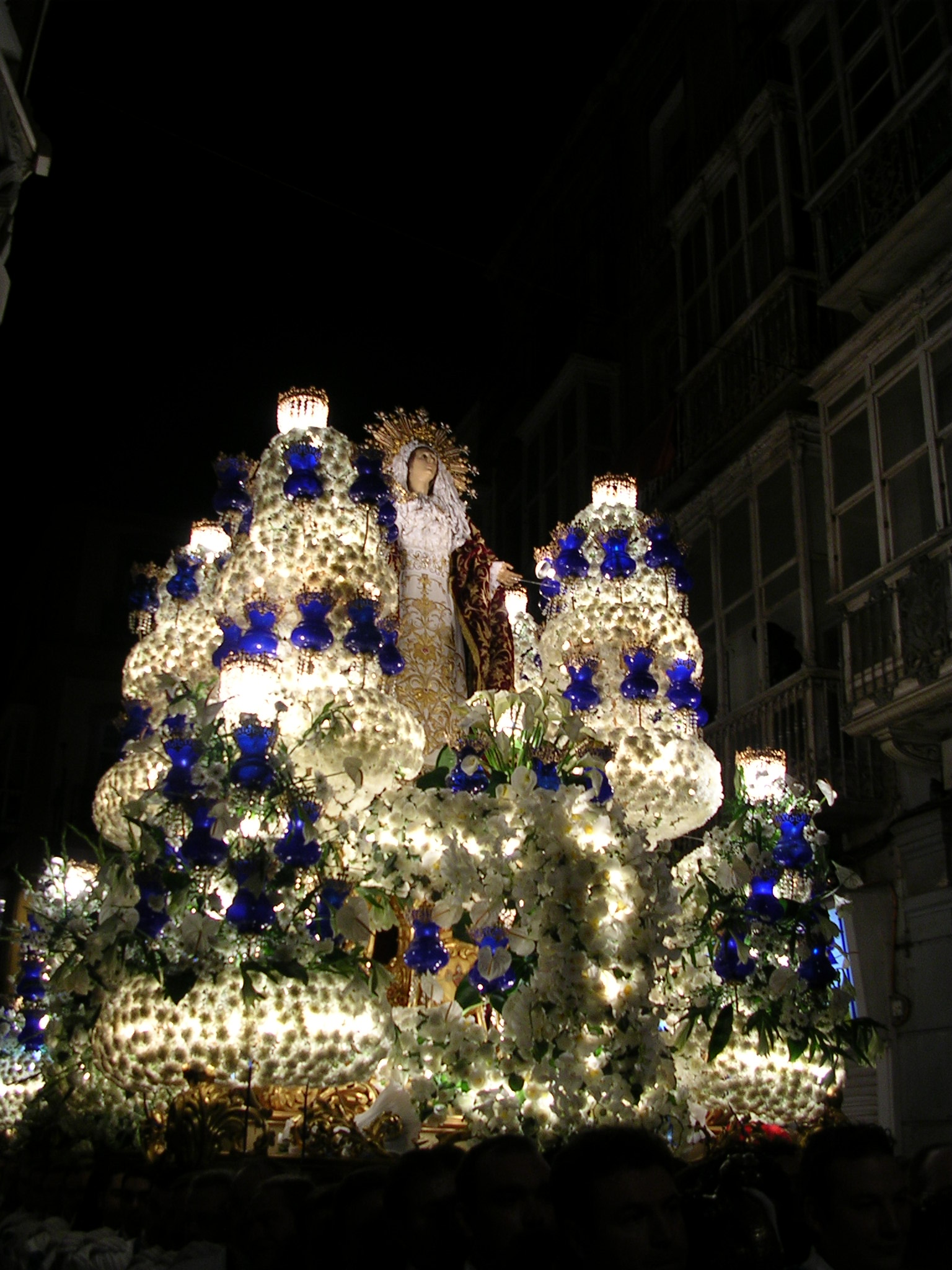 Virgen California (Cartagena)